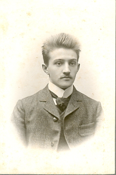 De Mathias Koener als Student zu Oochen.